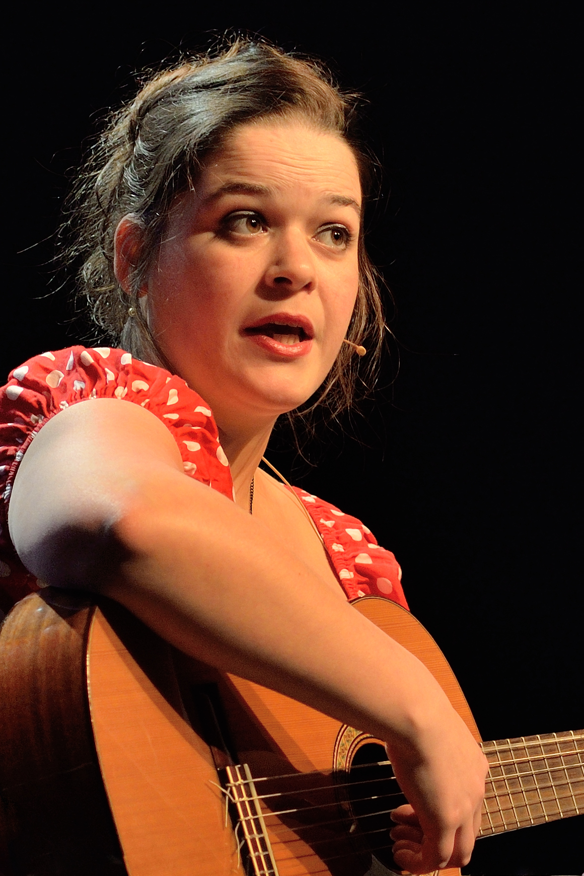 Optreden Katinka Polderman in CC De Ploter in Ternat (B)